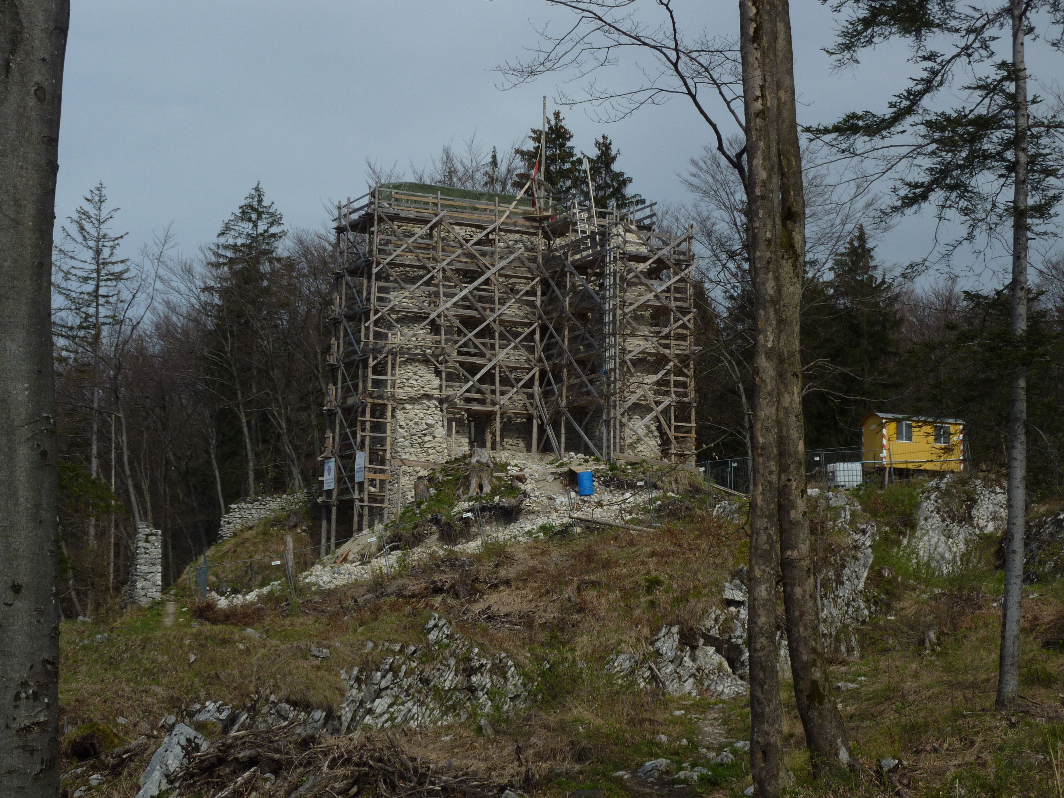 Die Burgruine Thürndl, Instandhaltung 2014